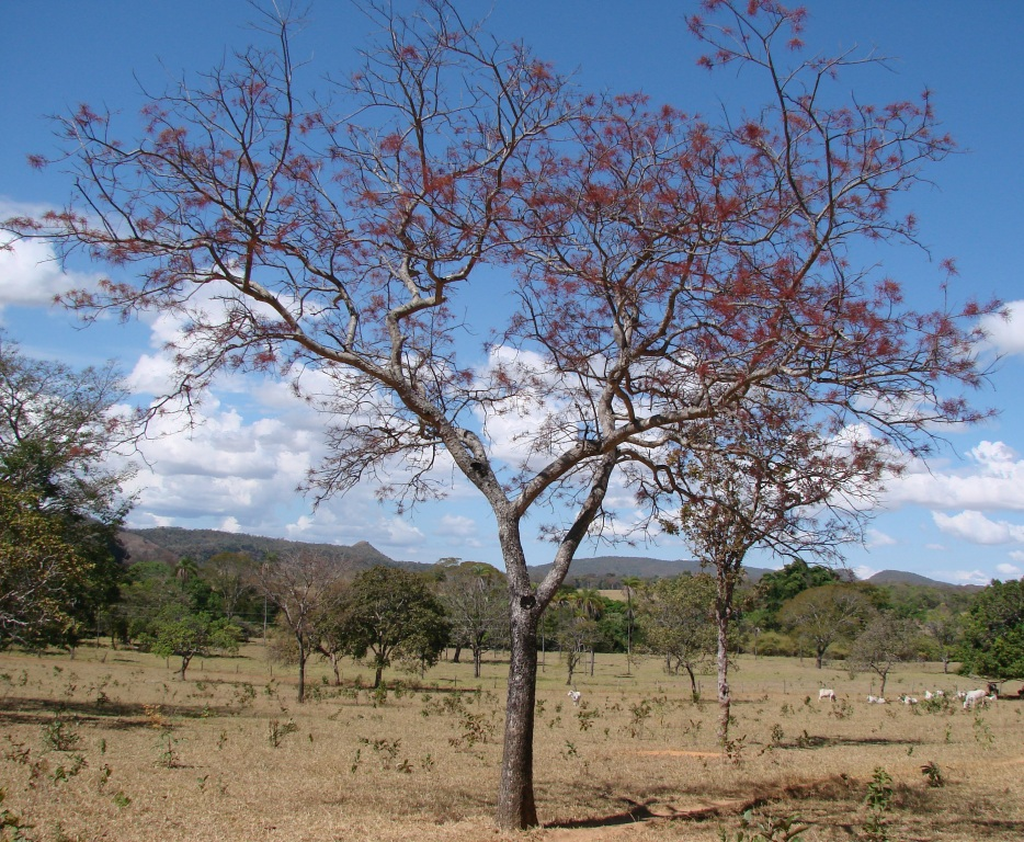 Myracrodruon urundeuva - ANACARDIACEAE Formosa - Goiás - Brasil.